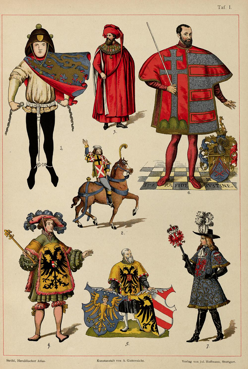 Hugo Gerhard Ströhl: "Heraldischer Atlas". Stuttgart 1899. Tafel 1 "Herolde des 14.–17. Jahrhunderts", Tafel